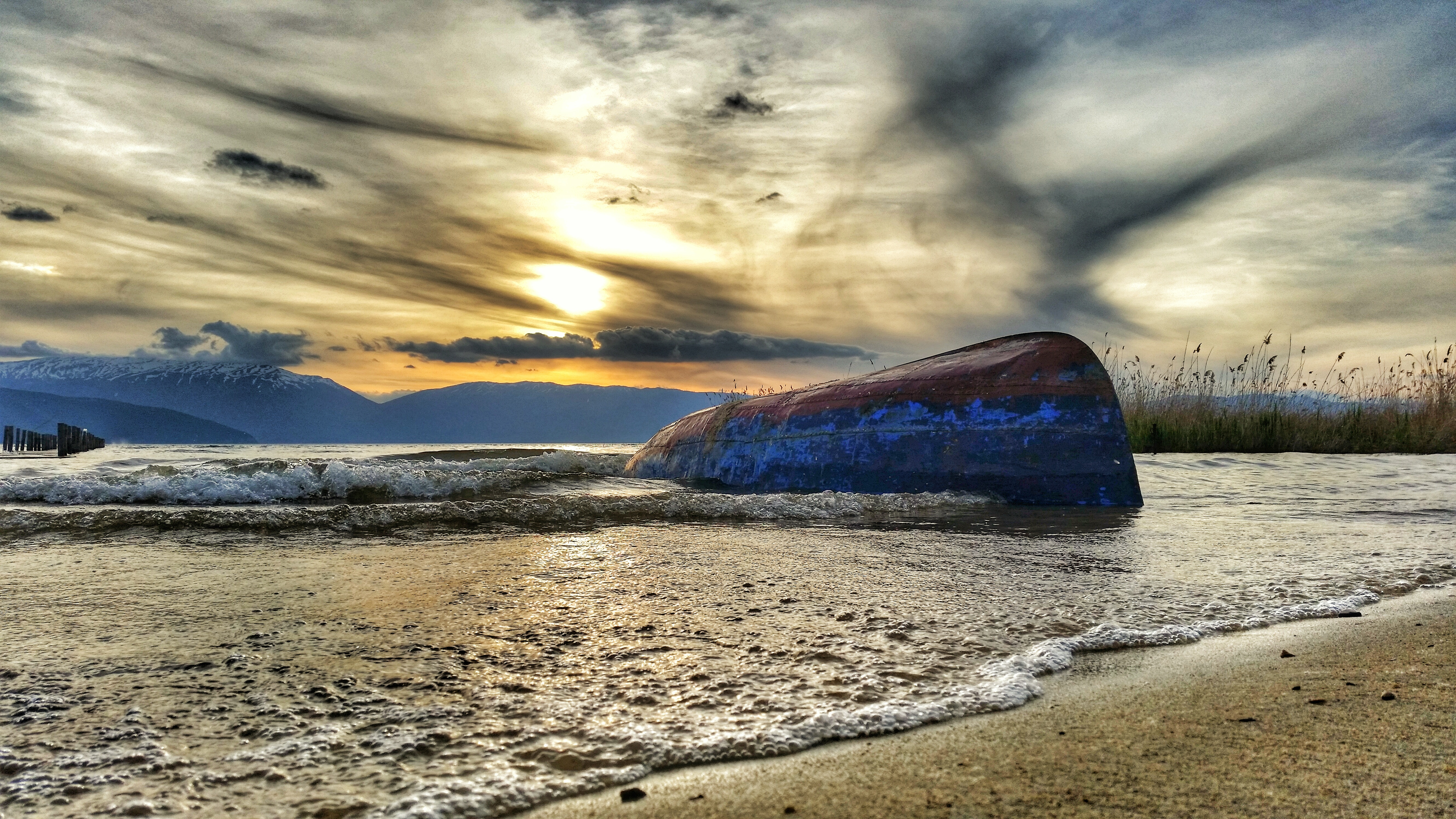 Ова е фотографија од зајдисонце на Преспанско Езеро. Фотографирано од плажата Крани на ден: 03.05.2015 година.